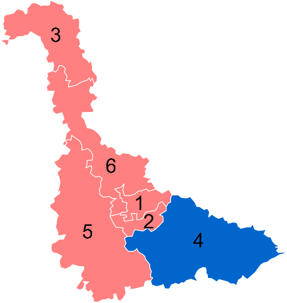 Résultats des élections législatives de la Meurthe-et-Moselle en 2012